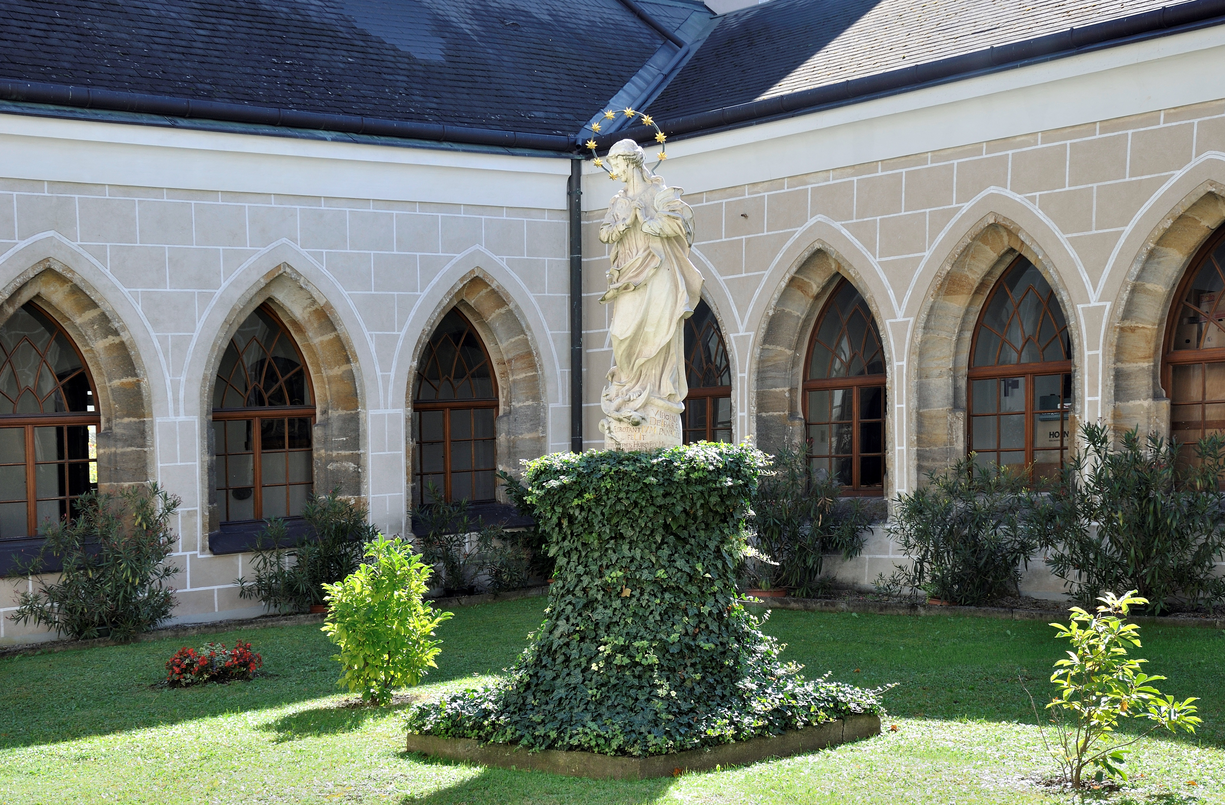 Figurenbildstock Maria Immaculata